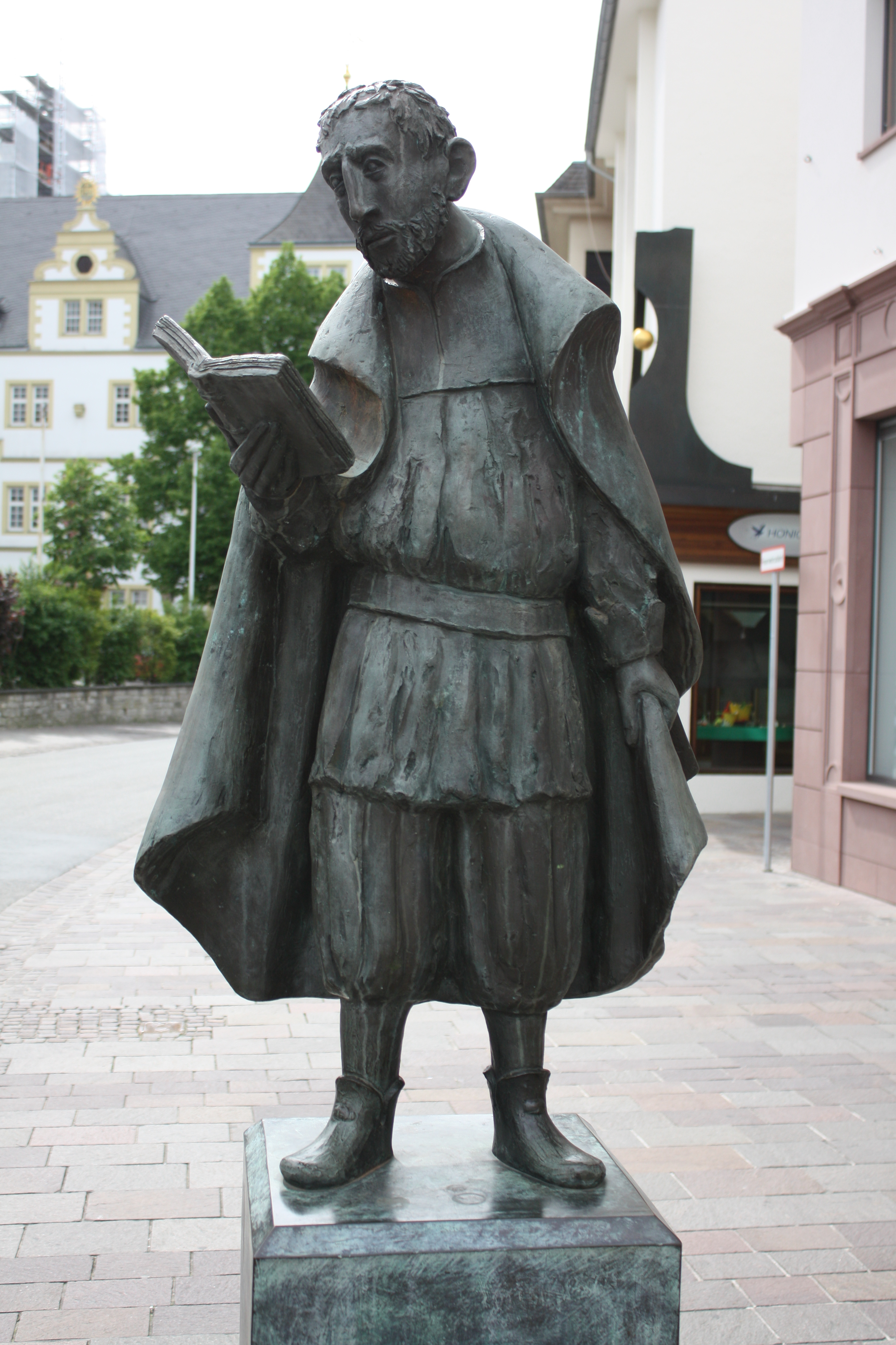 Bronzstatue des Friedrich von Spee auf dem Kamp, vor der Bank für Kirche und Caritas. Bildhauer: Heinrich Gerhard Bücker (1994). Vgl. Bernhard Schmitt: Das Spee-Gedächtnis in verschiedenen deutschen Städten in den Jahren 1992-1994. Spee-Jahrbuch 1995, S. 173 f.